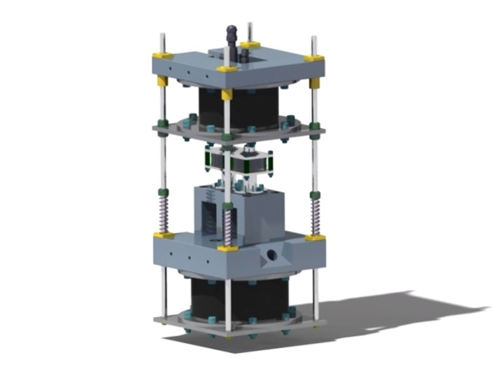 Représentation du moteur Ericsson développé par Assystem sous le brevet FR20110051910 20110309 publié le 14 septembre 2012